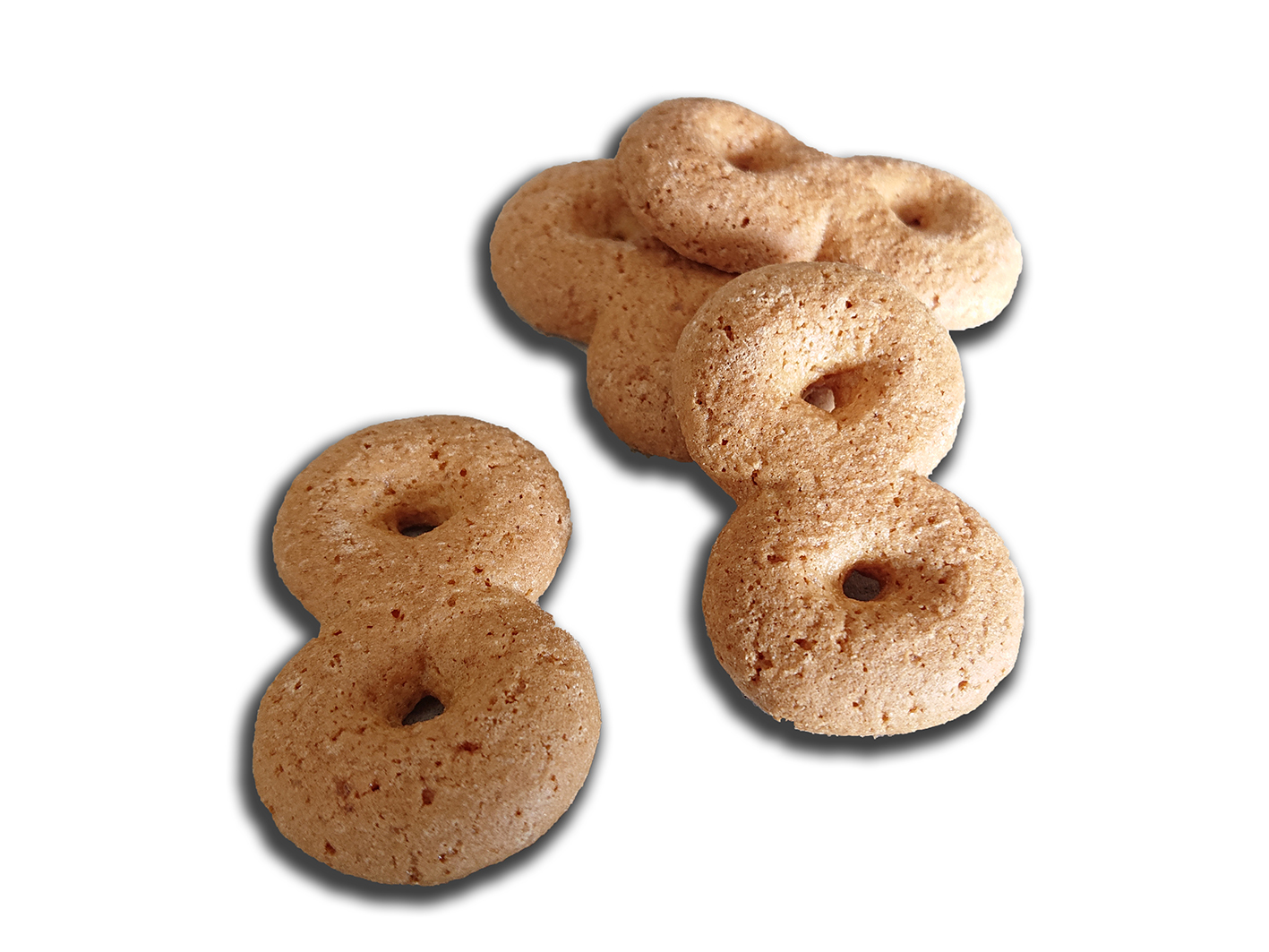 「8の字」の画像（静岡県内で主に販売されている焼菓子）